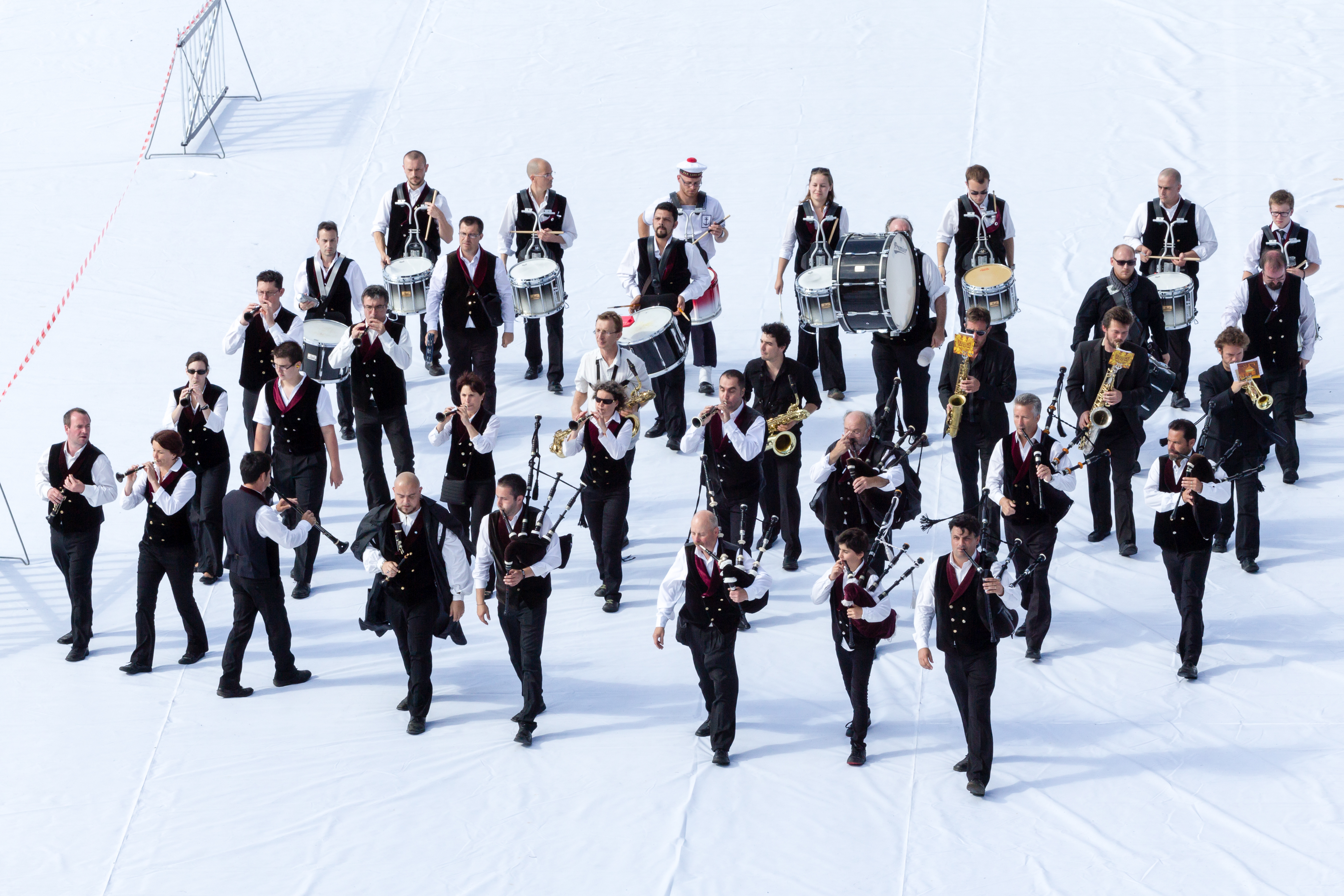 FIL 2012 - Arrivée de la grande parade des nations celtes - Bagad Sant-Nazer